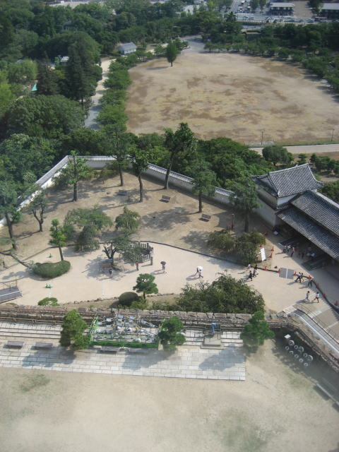 姫路城の縄張り構造。手前から本丸（備前丸）・二の丸（上山里曲輪）・下山里曲輪（樹木の影で見えない）・三の丸（三の丸広場）。